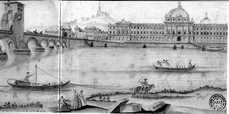 L'Hôtel-Dieu de Lyon et le pont de la Guillotière à la fin du XVIIIe siècle. Aquarelle anonyme.